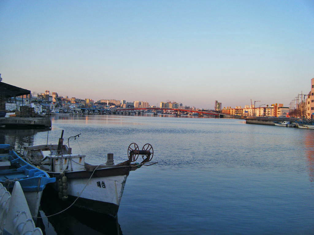 포항 죽도어시장 바라본 동빈내항